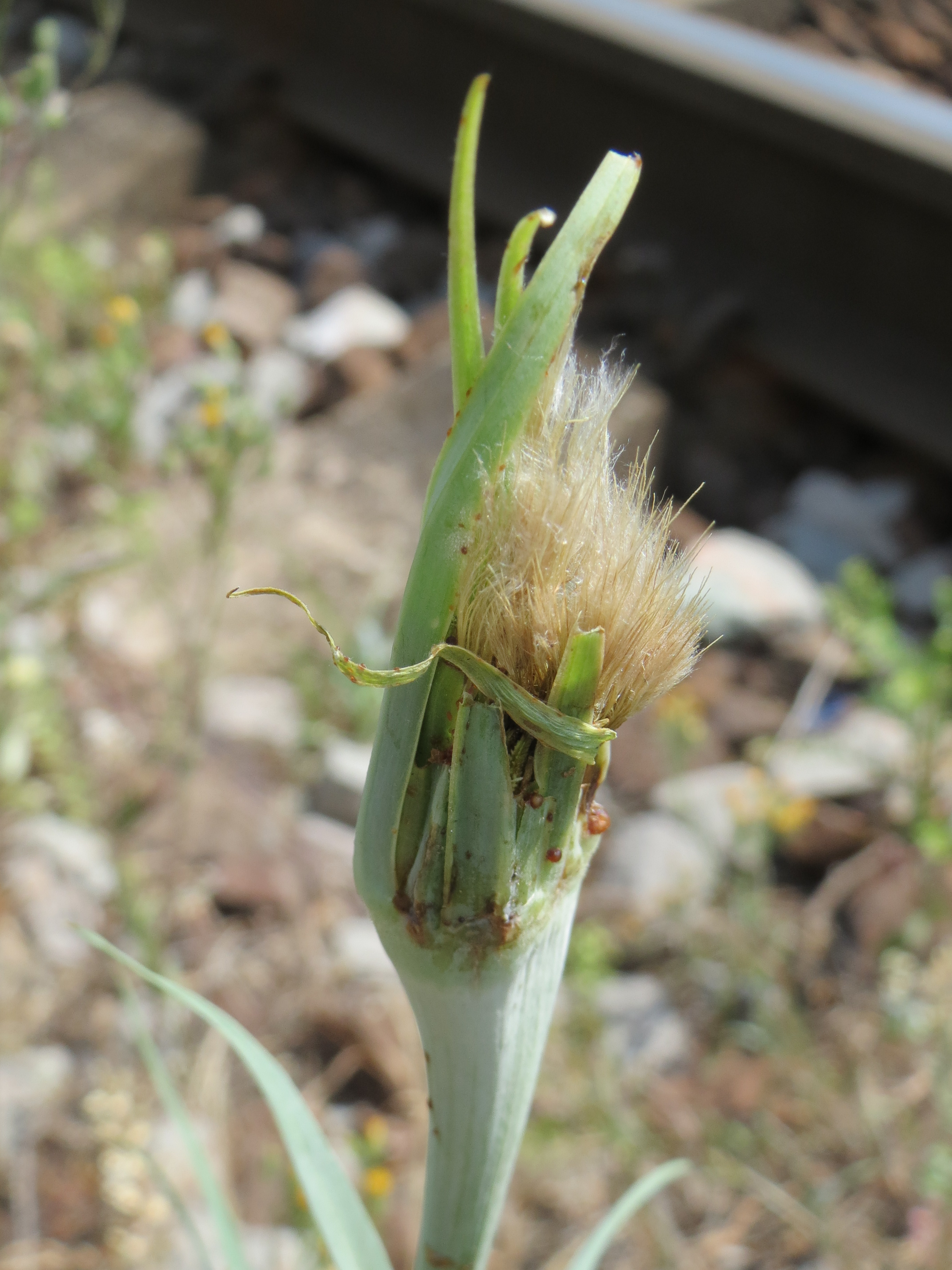 Großer Bocksbart (Tragopogon dubius) am Bahnhof Saarbrücken Ost